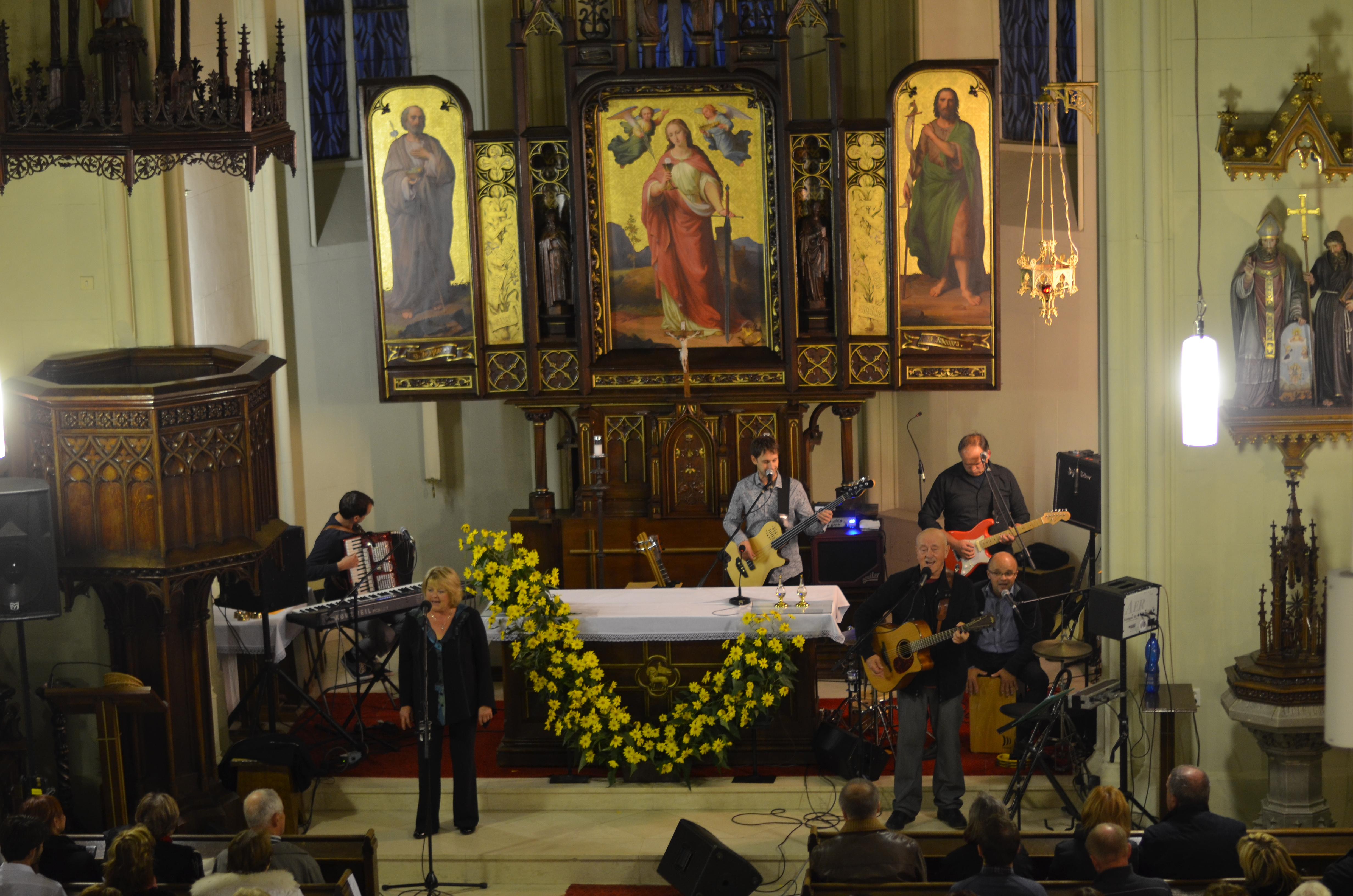 Javory Beat při koncertě v kostele svaté Barbory v Adamově